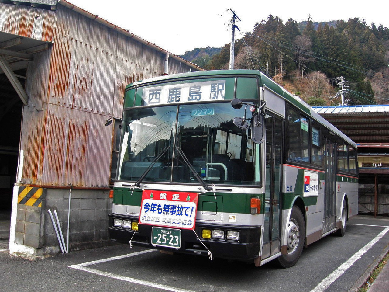 遠鉄バス北遠本線の車両（水窪町停留所にて）